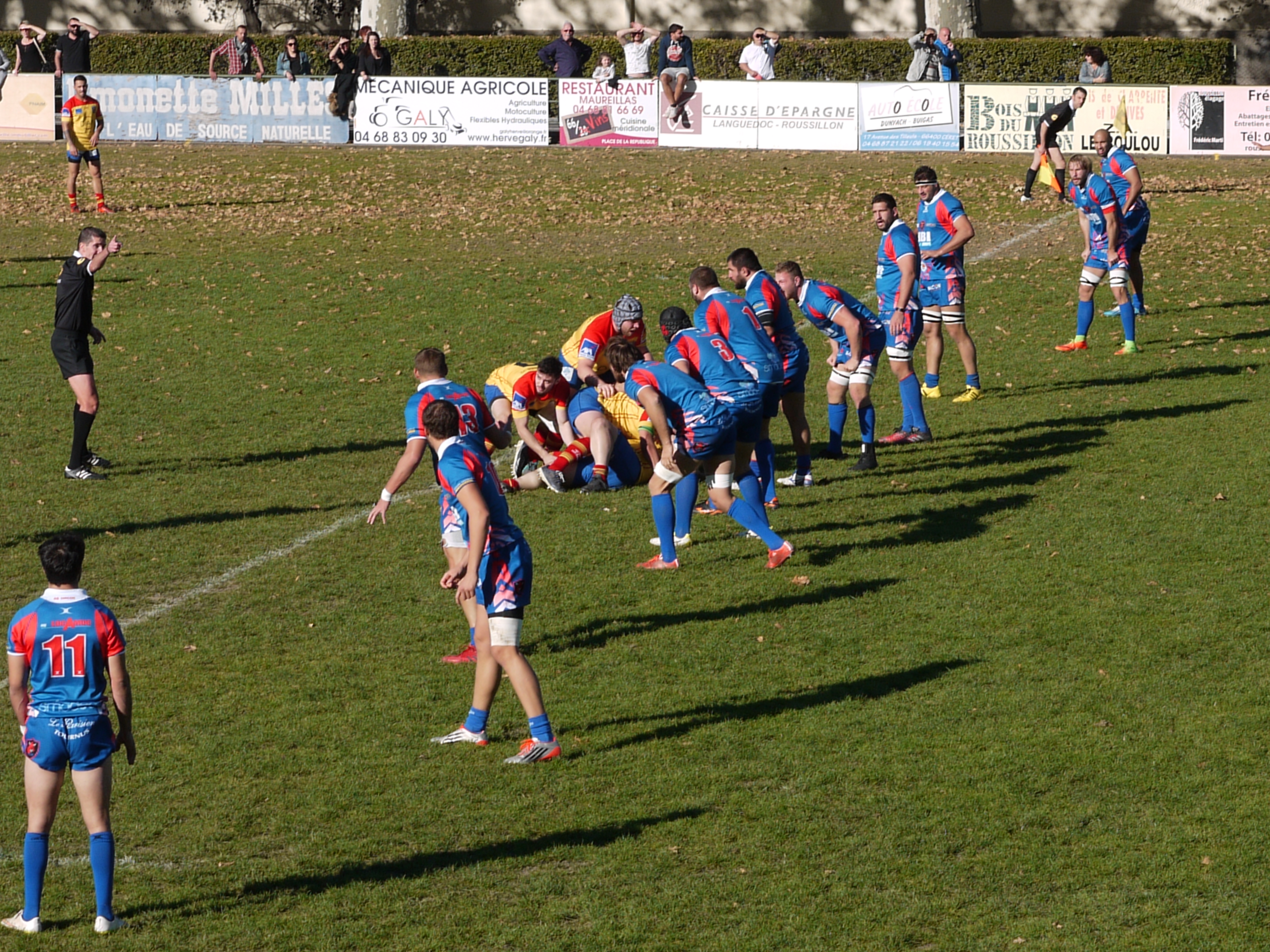 Le Céret sportif contre l'AS Macôn à Céret le 29 octobre 2017.